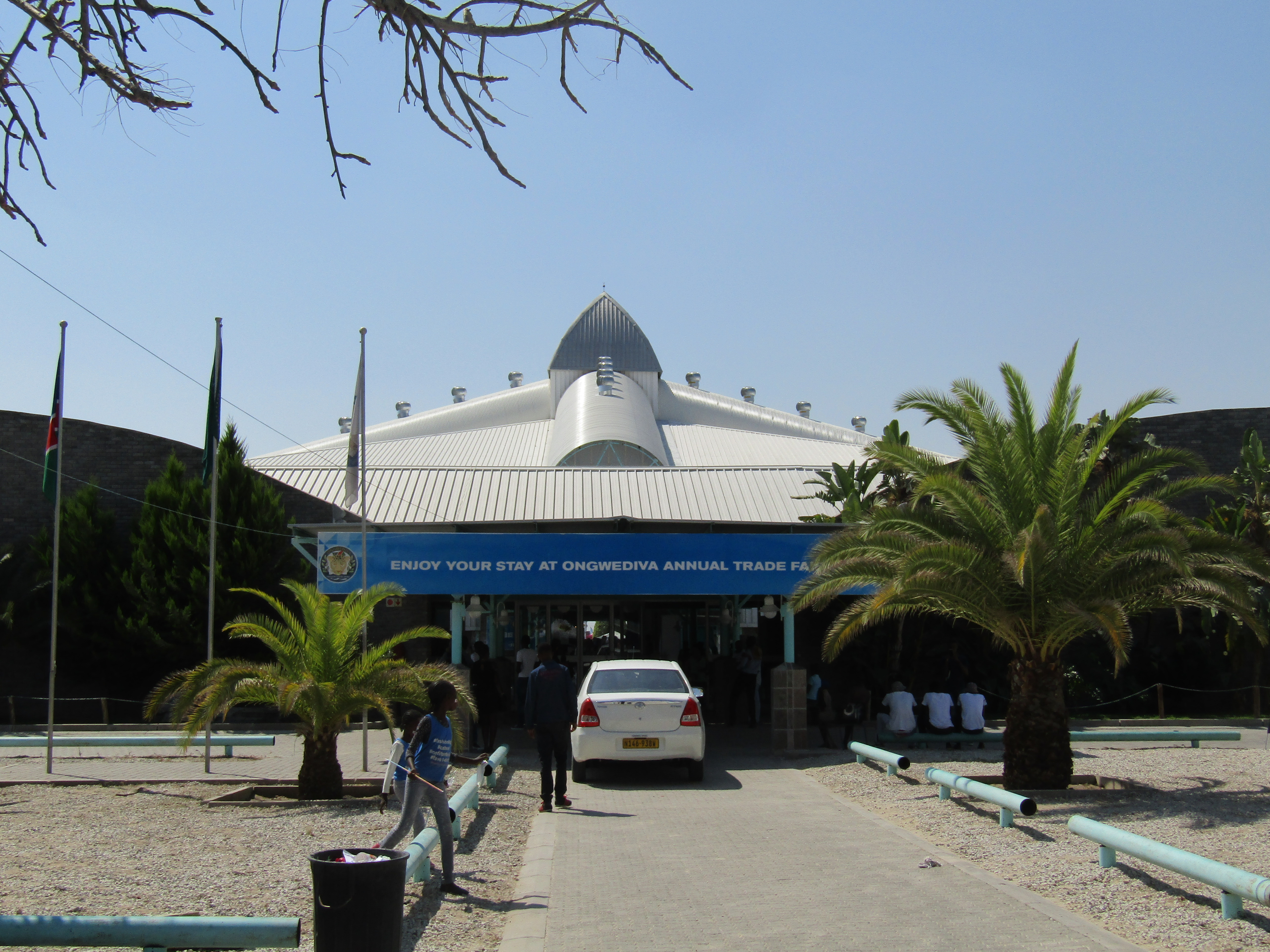 Ongwediva Fair Grounds